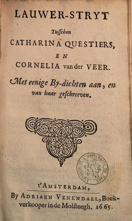 Titelblad van "Lauwer-stryt tusschen Catharina Questiers en Cornelia van der Veer; met eenige Bij-dichten aan, en van haar geschreeven" (Amsterdam, Adriaen Venendael, 1665). Dichtwisseling tussen twee zeventiende-eeuwse dichteressen. Ook: Lauwerstrijd, Lauwerstryd, Lauwerstryt.